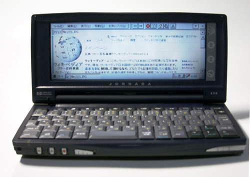 Handheld PC Jornada_690 by Hewlett-Packard